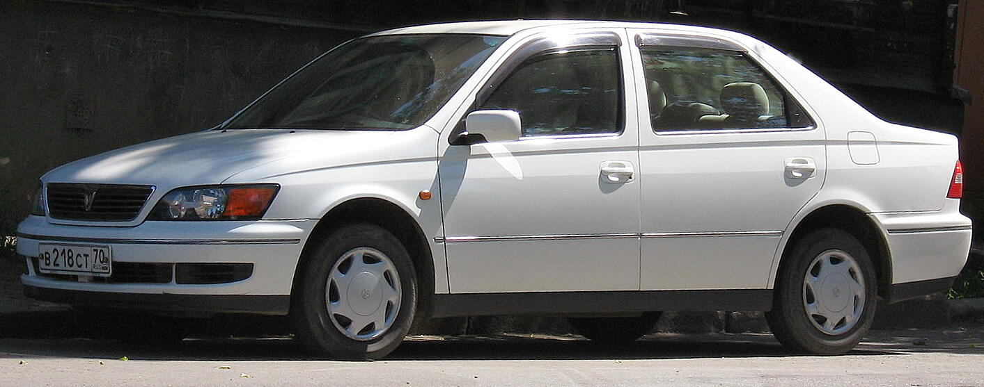 Photo taken in Tomsk, Russia